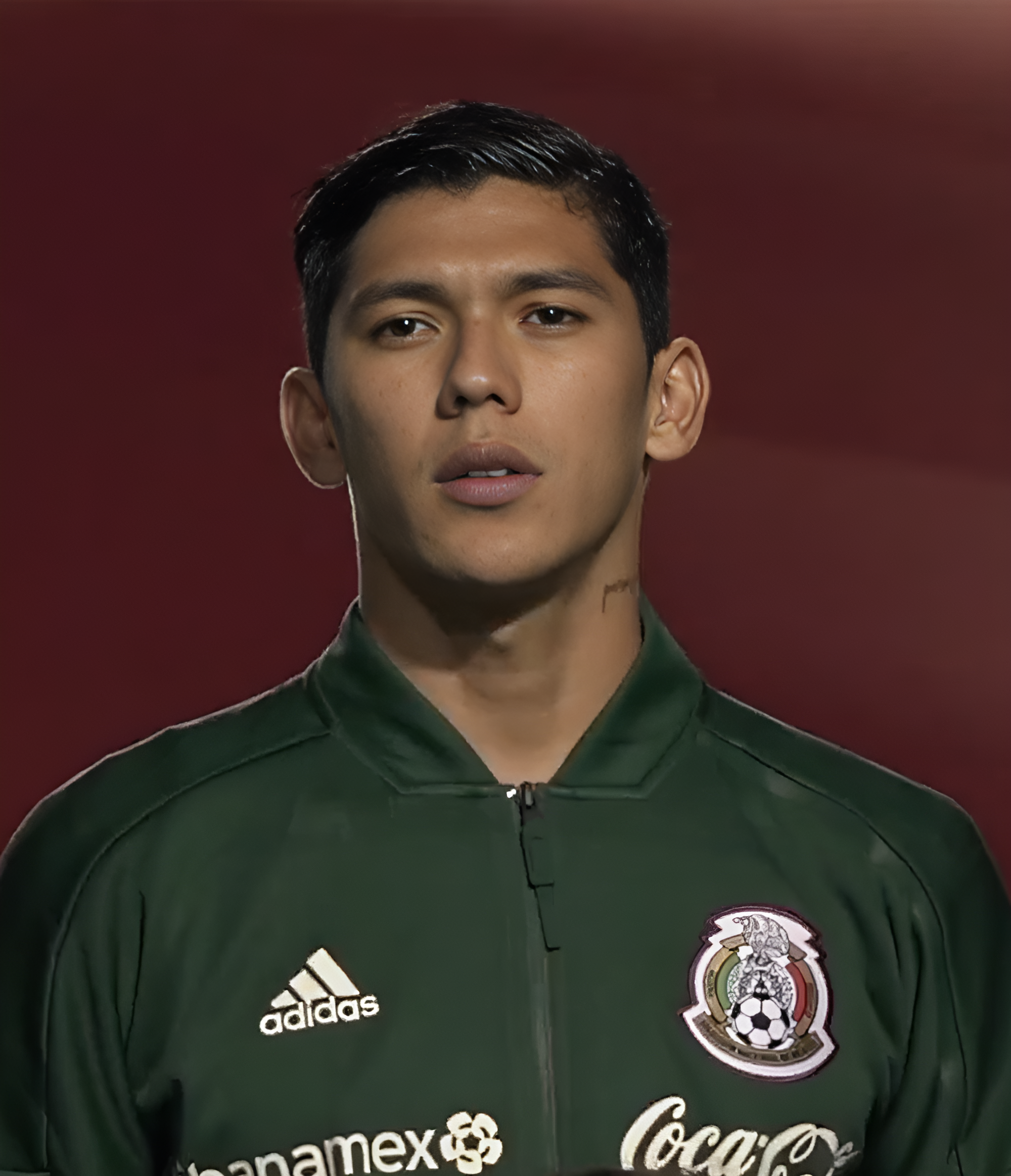 Gerardo Arteaga en 2018.